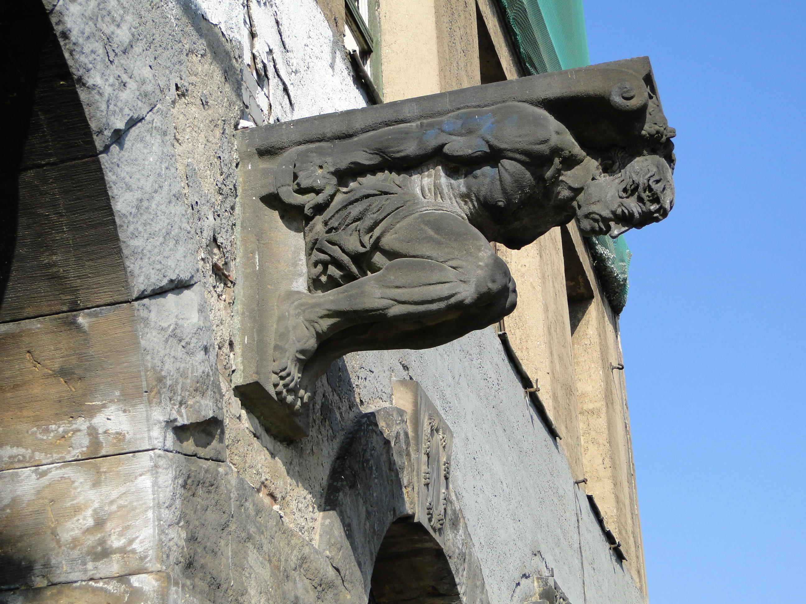 Stadthaus Friedrichstadt, Fassadendetail